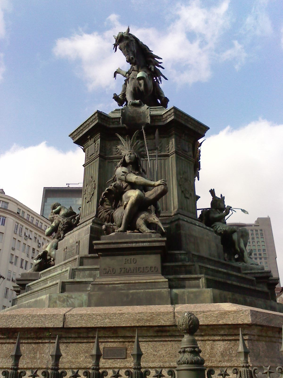 Monumento a Pedro I do Brasil, praça Tiradentes, centro histórico do Rio de Janeiro, estado do Rio de Janeiro, Brasil: alegoria ao rio São Francisco.